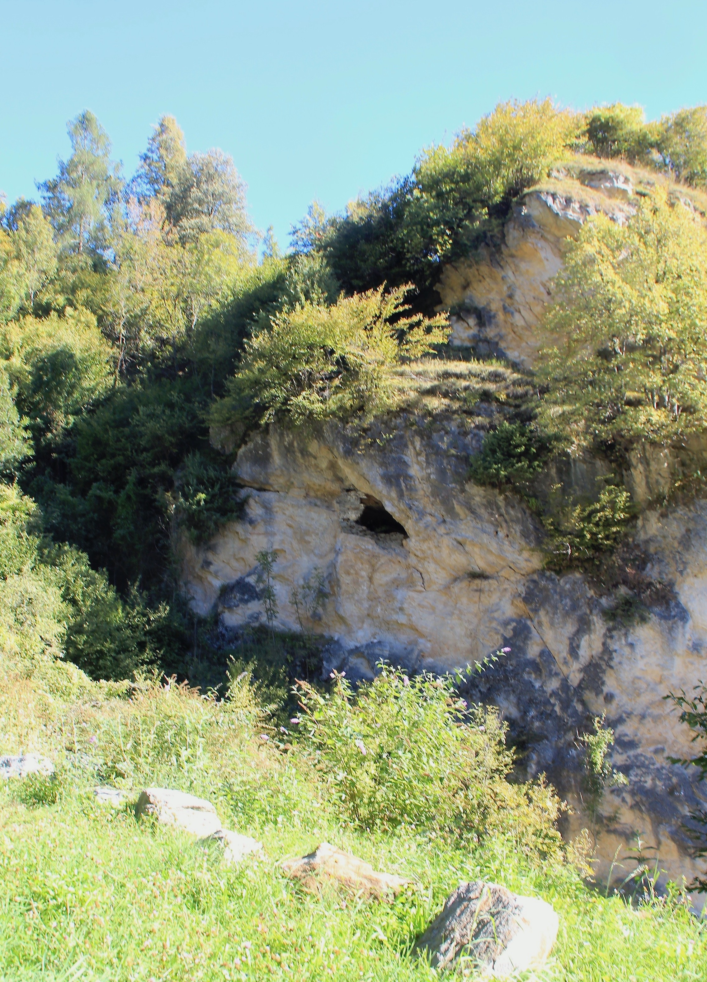 Case dei Pagani Ansicht von Westen